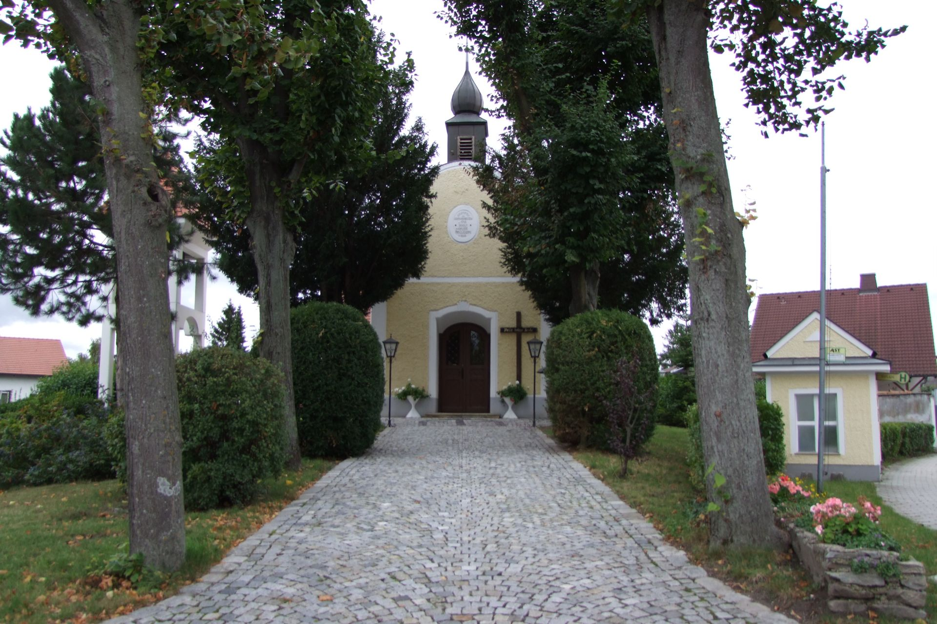 Kath. Filialkirche hll. Gertrud und Mechthild